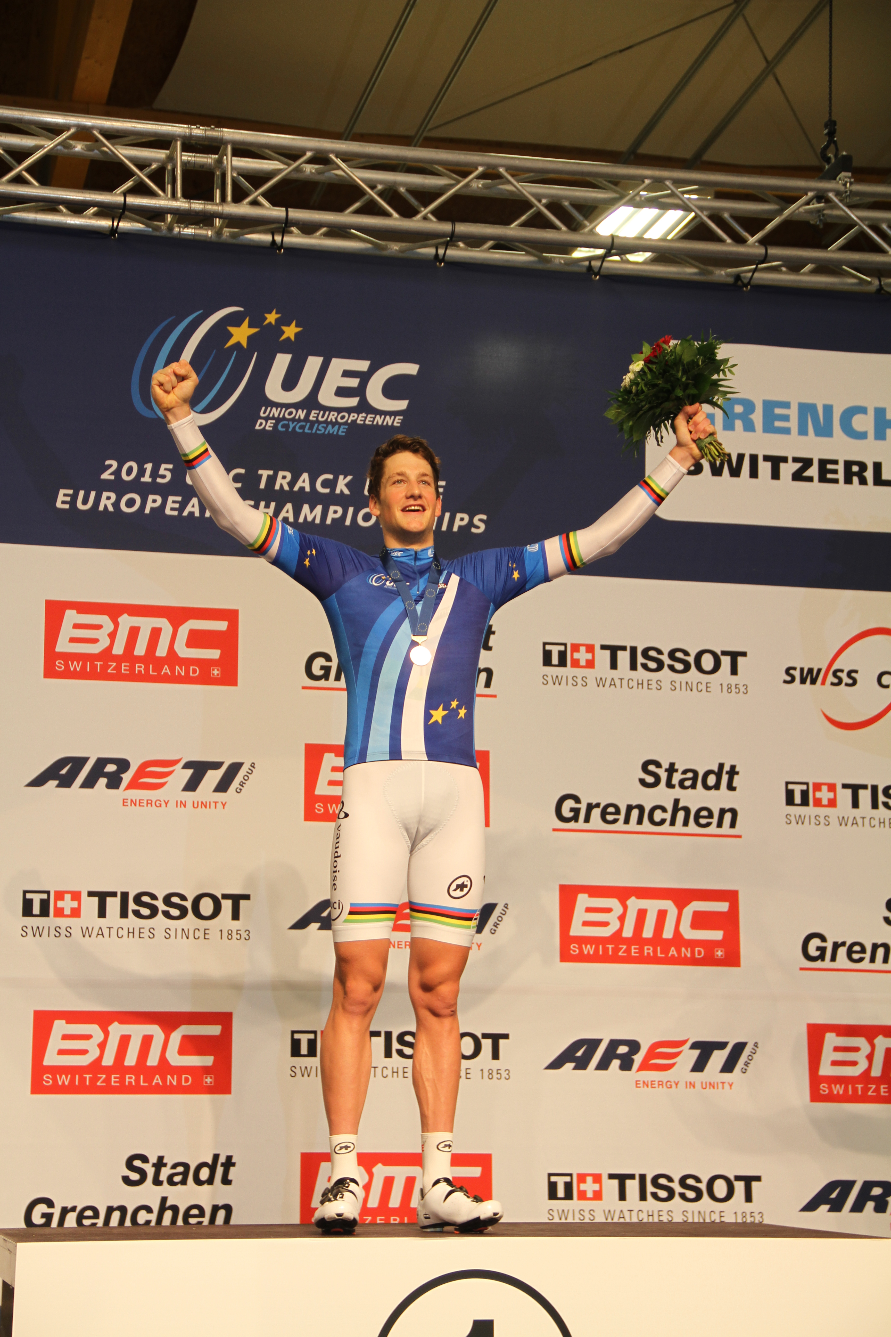 Stefan Küng, Schweizer Radsportler, Europameister in der Einerverfolgung The making of this document was supported by the Community-Budget of Wikimedia Germany.